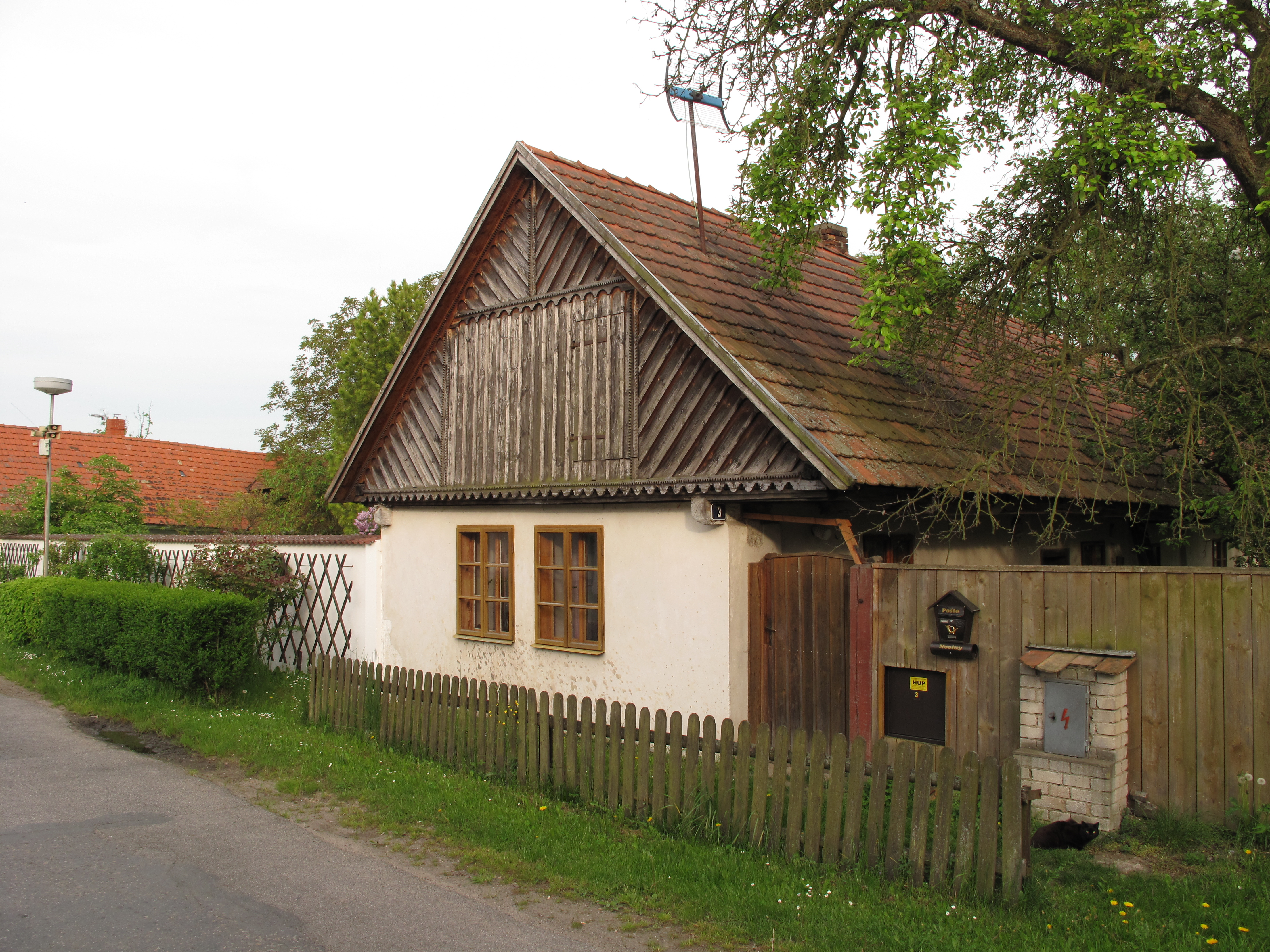 Chalupa v Podolí. Okres Nymburk, Česká republika.